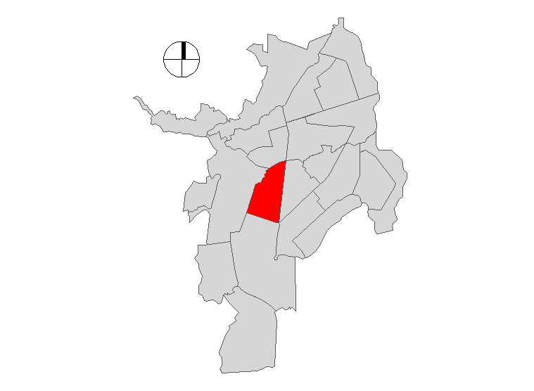 Comuna 10 de Santiago de Cali, Colombia.